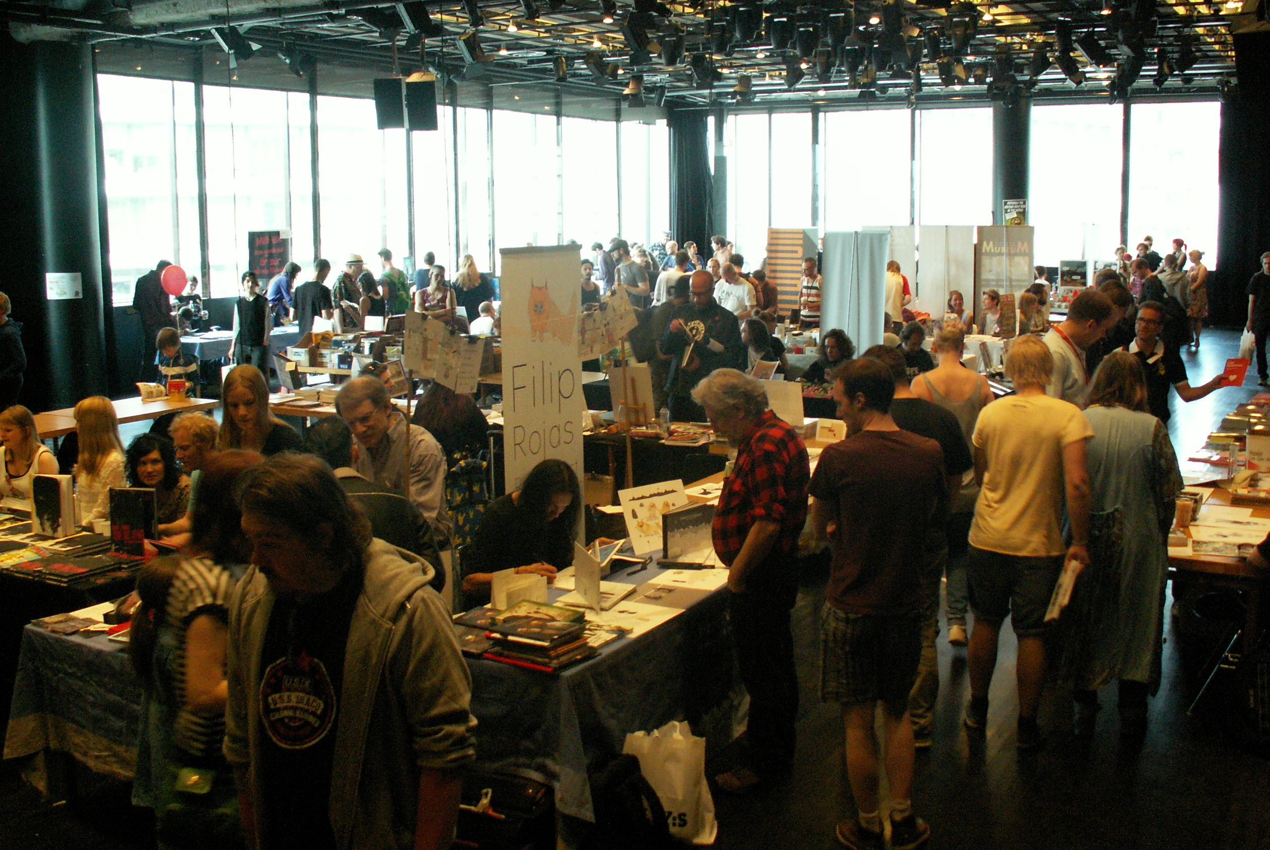 Mässdelen (Small Press Expo) i hörsalen på våning 3, del av Stockholms internationella seriefestival 2014.